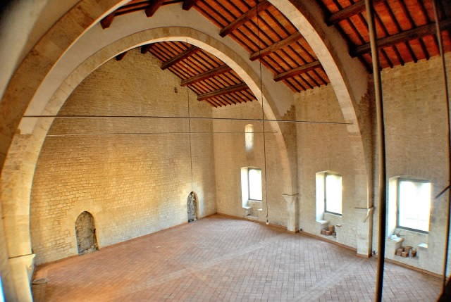 La grande sala ad archi ogivali di Palazzo Gottifredo in Alatri, Lazio, Italia